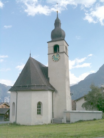 reformierte Kirche Urmein (Kanton Graubünden)